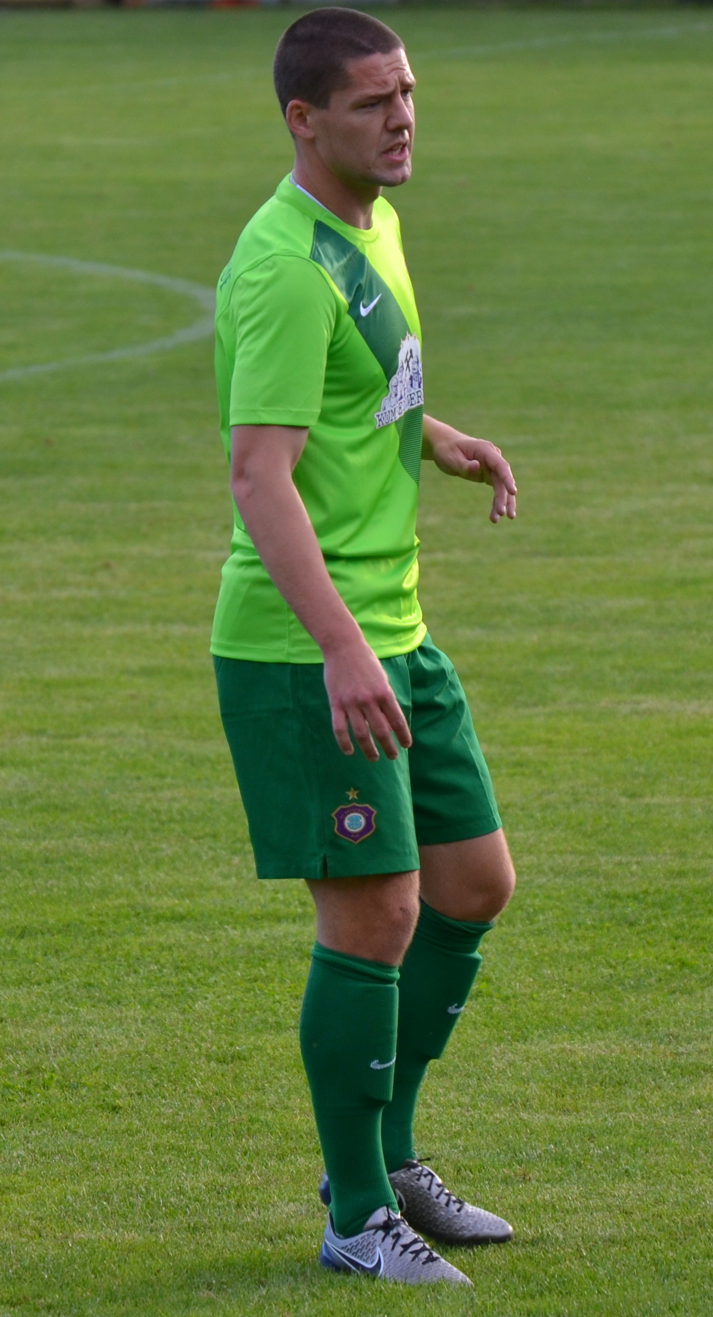 Adam Susac beim Freundschaftsspiel von Erzgebirge Aue beim HFC Colditz im Juni 2016